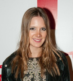 Кира Пластинина 20 марта 2011 года на премьере фильма «Служебный роман: Наше время»